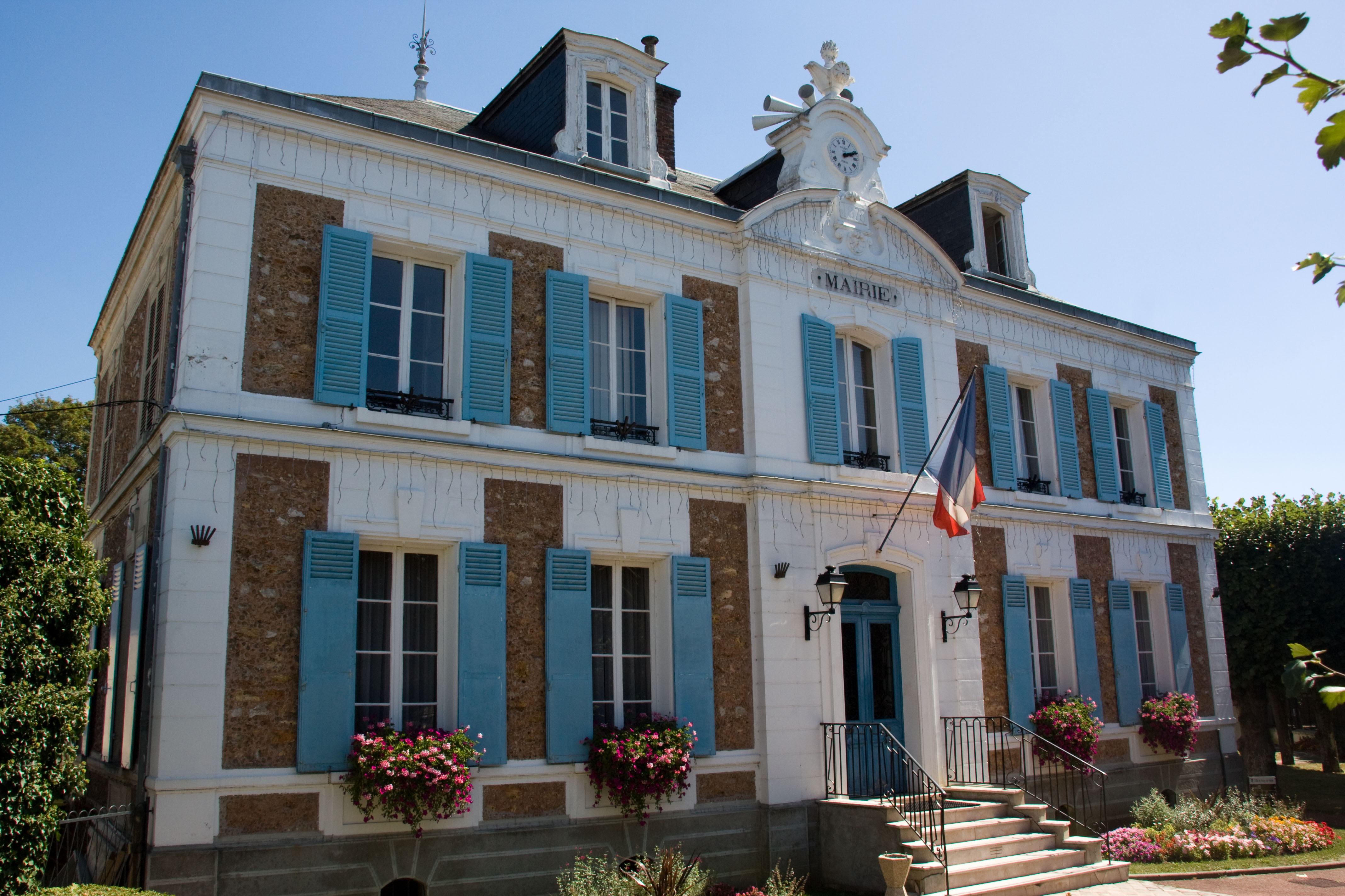 Mairie de Soisy-sur-Seine, Soisy-sur-Seine, Essonne, France